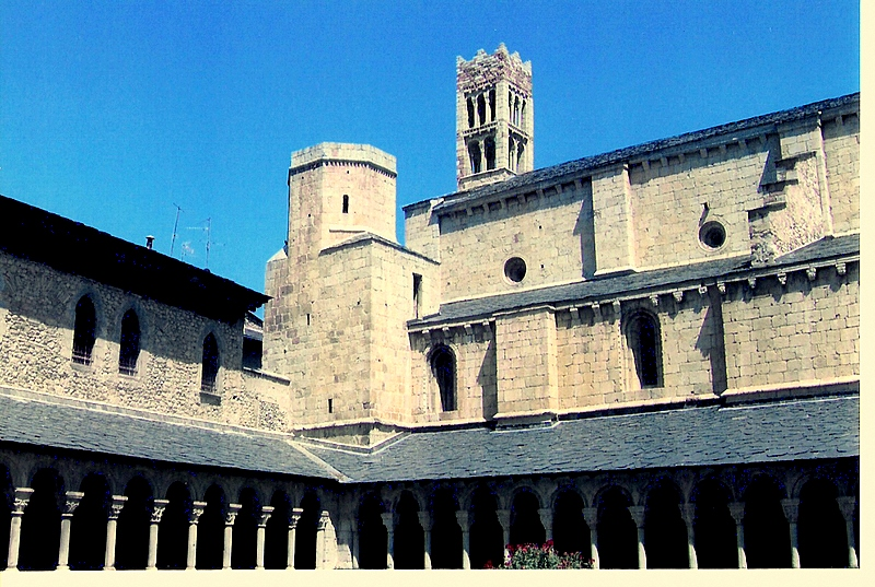 La Seu d´Urgell - Catedral i claustre